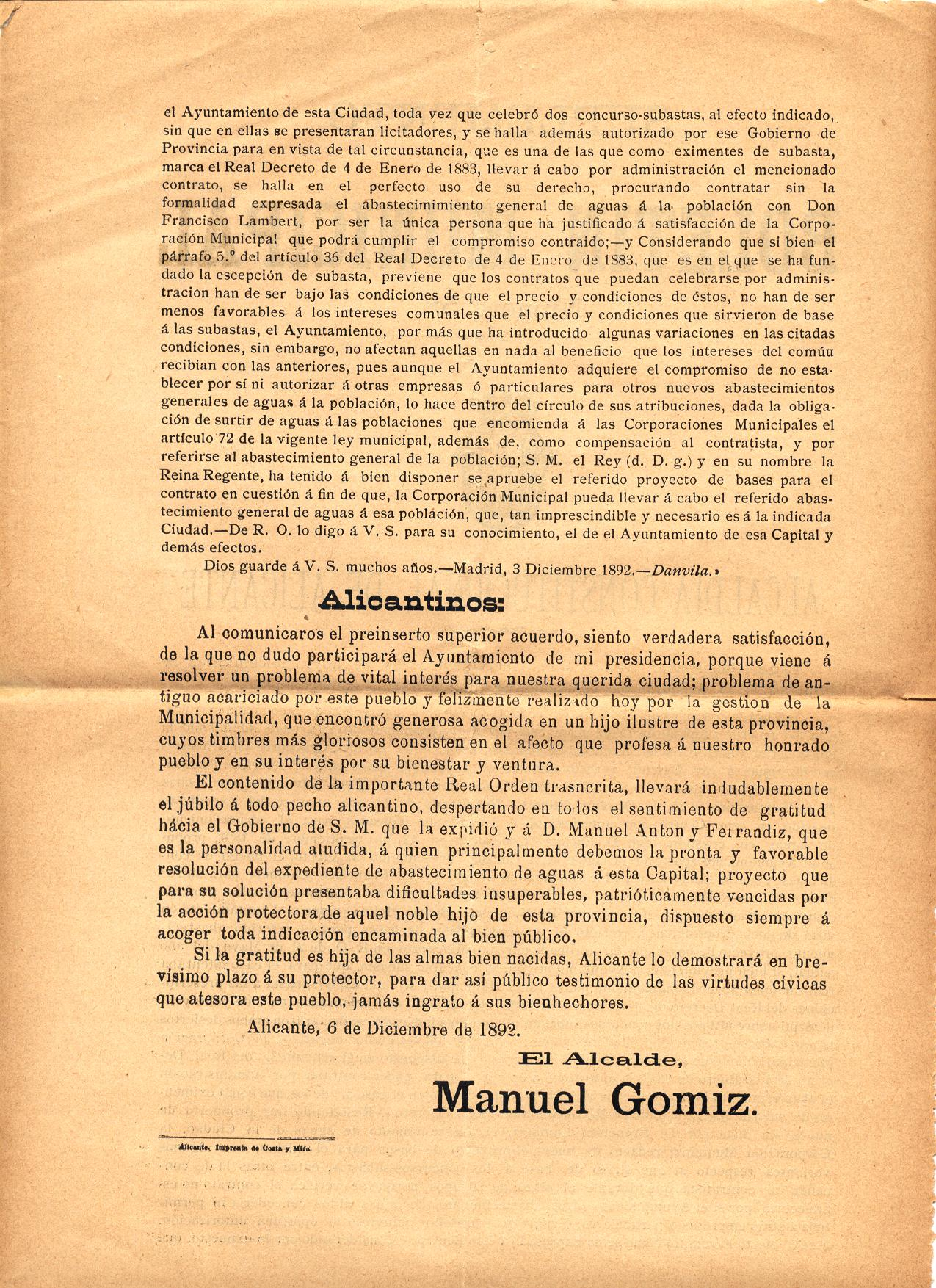 Alicante 1892. Boletín Municipal explicando el alcalde Manuel Gomiz el cambio Suministro Agua y agradeciendo la labor del diputado Anton Ferrandiz. PAGINA 2